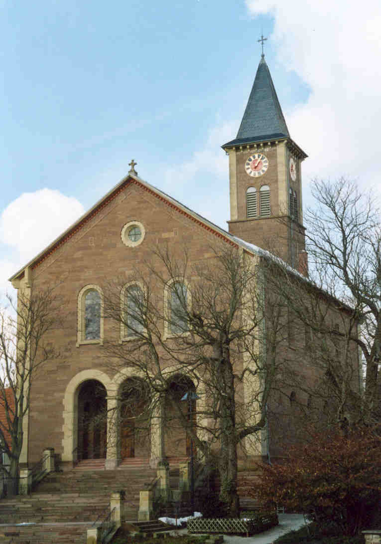 Evangelische Kirche in Bauschlott, Gemeinde Neulingen, Enzkreis, Baden-Württemberg; erbaut 1838 nach Entwurf von Heinrich Hübsch (Karlsruhe) im Stil des Klassizismus